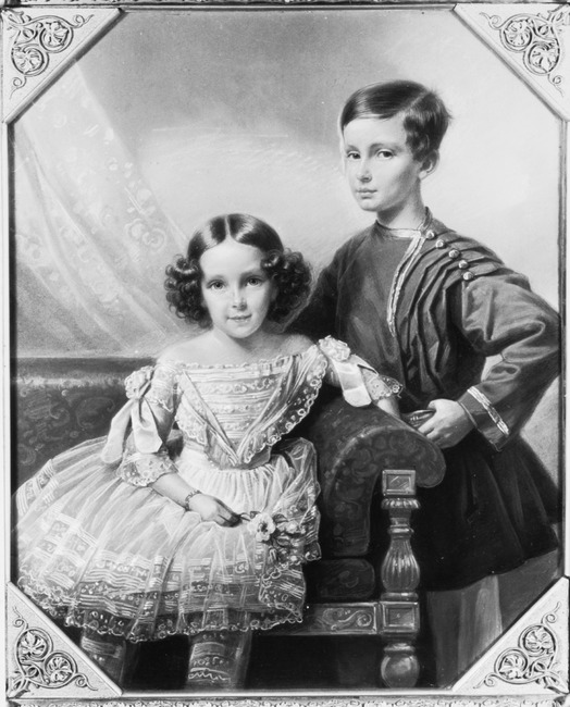 Portret van prins Frederik jr (1836-1846) en prinses Marie (1841-1910). Vervaardigd omstreeks 1845, auteursrecht verlopen. Afbeelding komt in meerdere publicaties voor. Deze versie gevonden op alwaar het zonder auteursrechten gekopieerd mag worden.